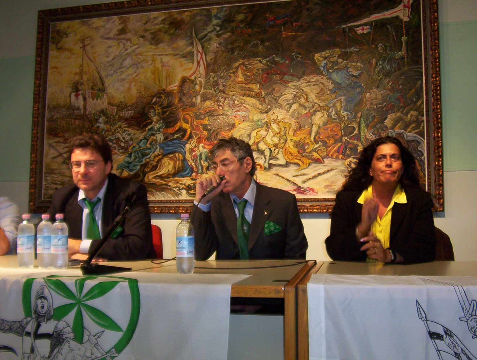 Umberto Bossi (al centro) nel 2005 al rientro dopo la malattia, parla a un incontro del Movimento Giovani Padani con lui Giancarlo Giorgetti e Rosy Mauro.